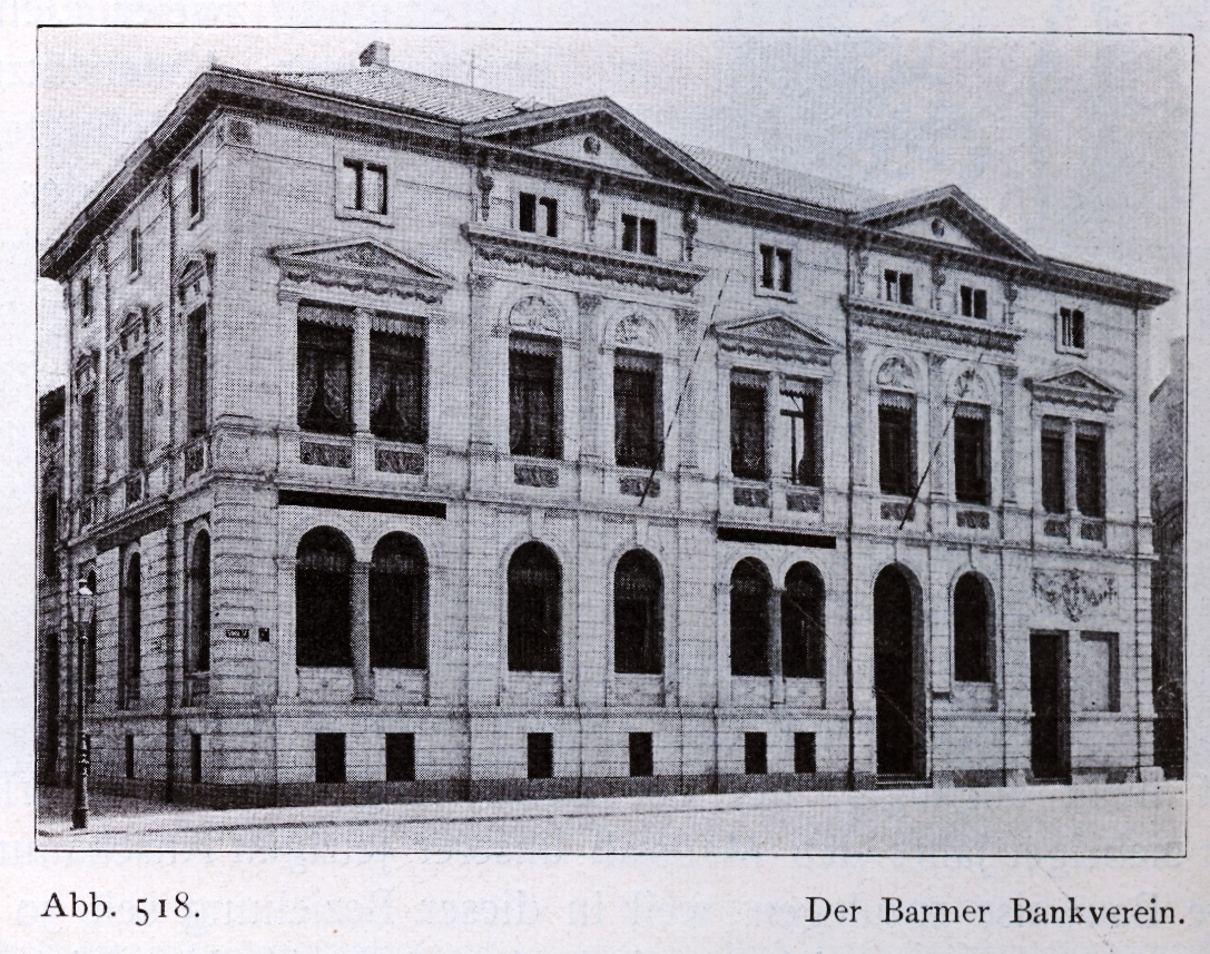 Hatzfeld'sches Palais in Düsseldorf, Steinstraße 20; erbaut in der zweiten Hälfte des 19. Jahrhunderts vom Architekten Franz Deckers, vor 1904 erworben vom Düsseldorfer Bankverein (später Barmer Bankverein) und durch den Architekten Wilhelm Kordt zum Bankgebäude umgenutzt